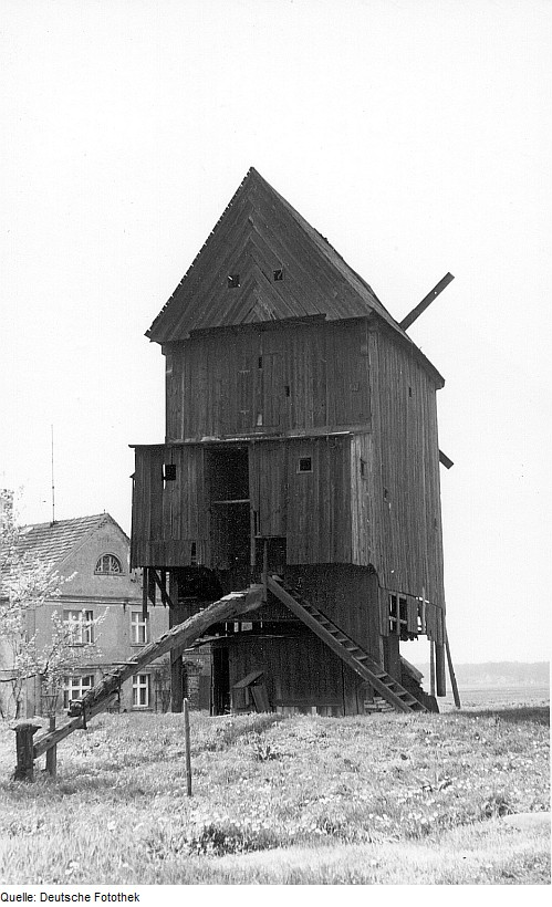 Original image description from the Deutsche Fotothek Fichtwald-Stechau. Bockmühle